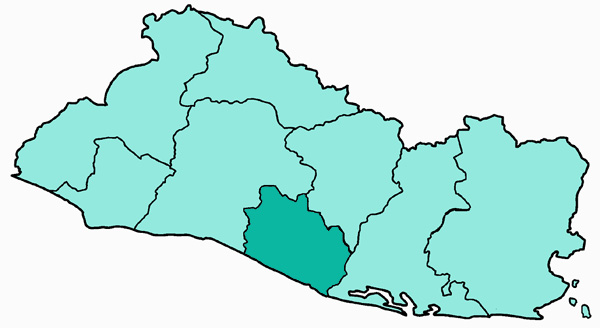 Mappa della diocesi cattolica di Zacatecoluca, in El Salvador. Lavoro personale eseguito a partire da questa immagine di Commons. Fonte per i confini delle diocesi